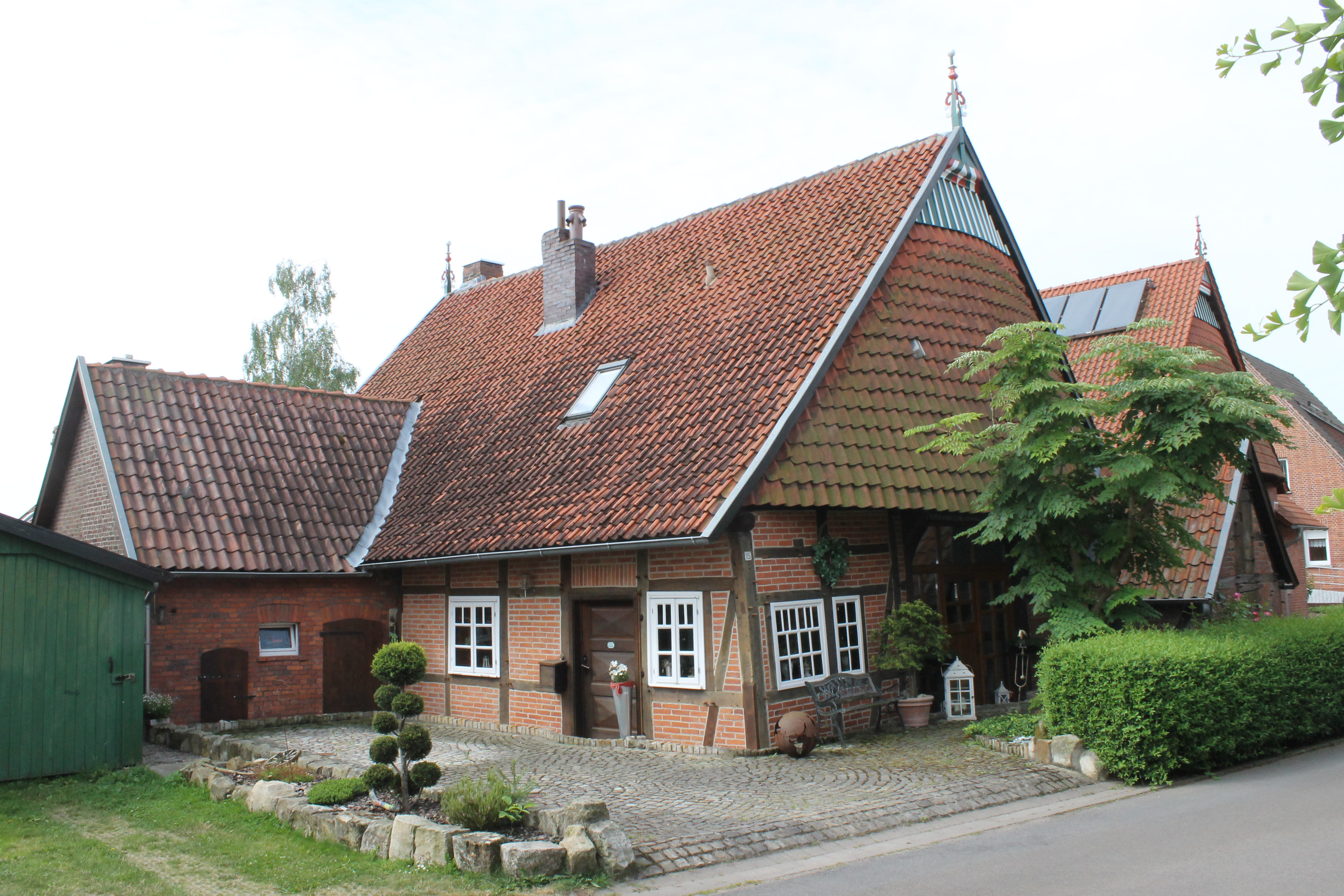 Fachwerkhaus in Frille